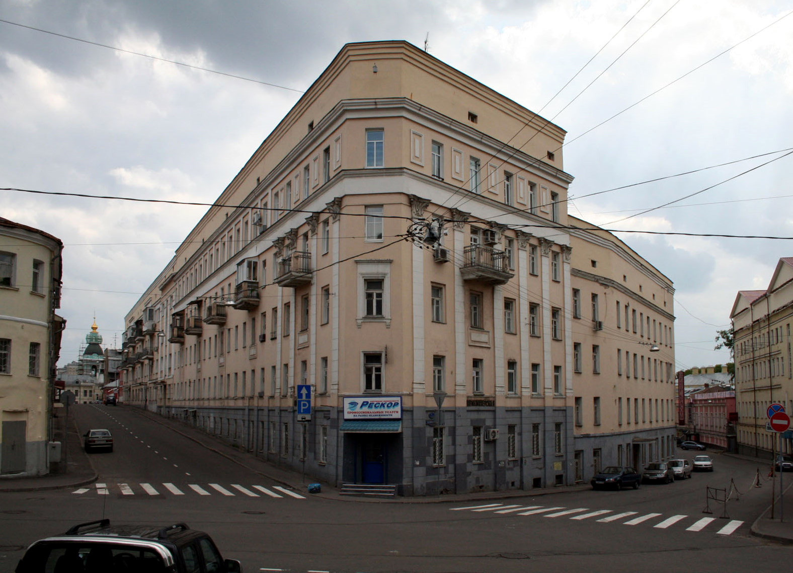 Дом "Утюг", описанный в книге "Москва и москвичи" сохранился до наших дней в перестроенном виде (1920-е гг). Его нынешний облик представляет теперь безусловный интерес. Во времена Гиляровского он был трёхэтажным.